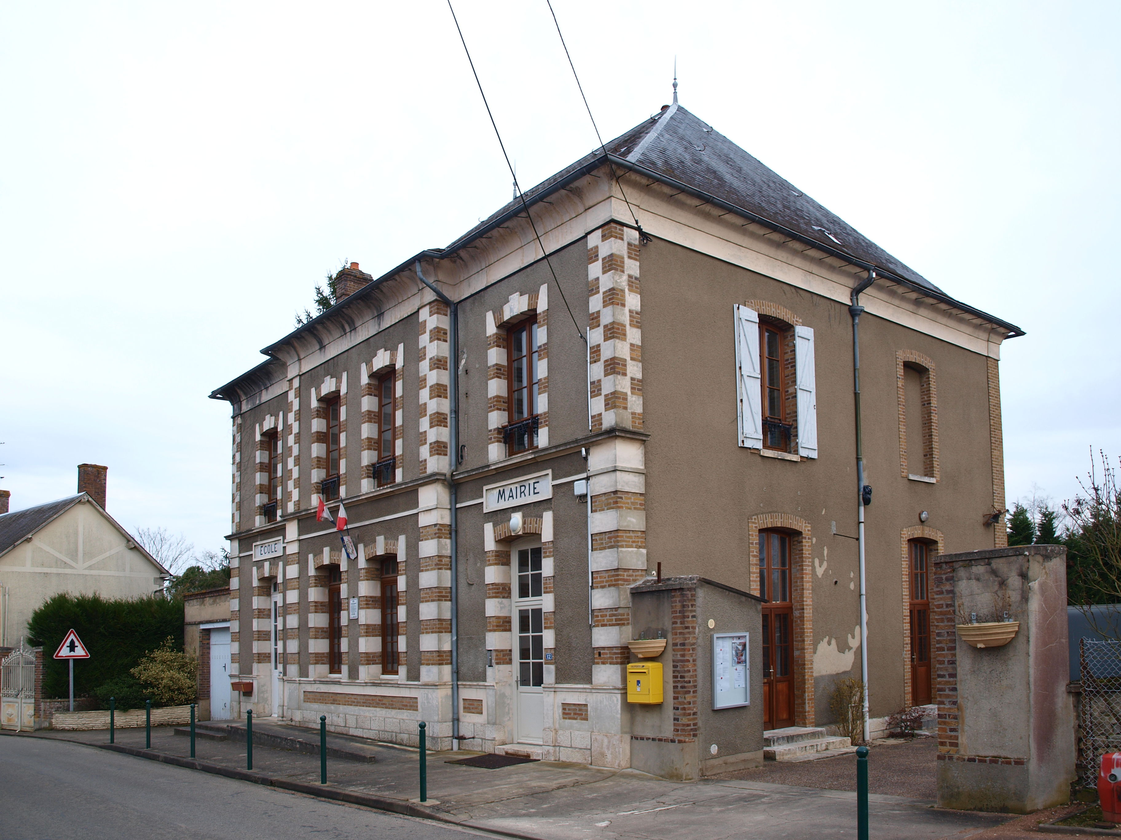 Griselles (Loiret, France) , mairie.